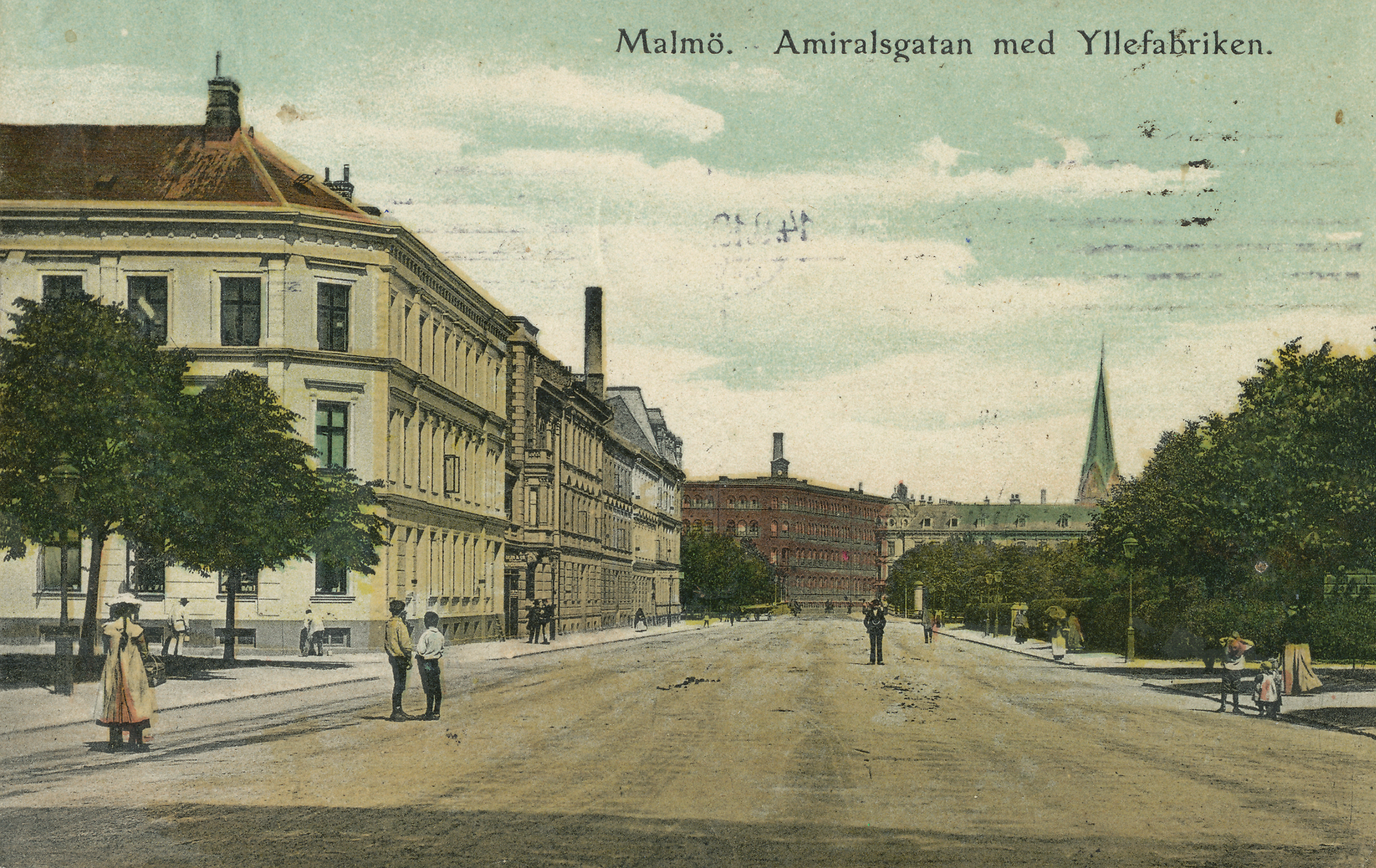 Amiralsgatan i Malmö ca 1900